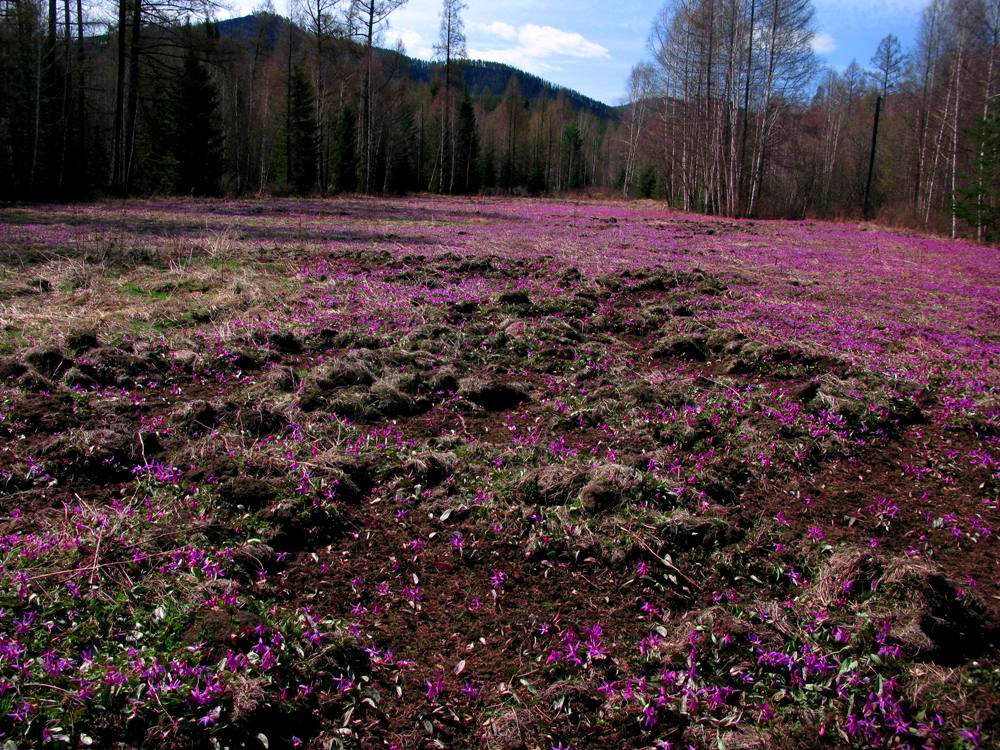 Поляна с цветущим кандыком саянским, разрытая кабанами. Парк "Ергаки", долина р. Ус. 05.02.2011.